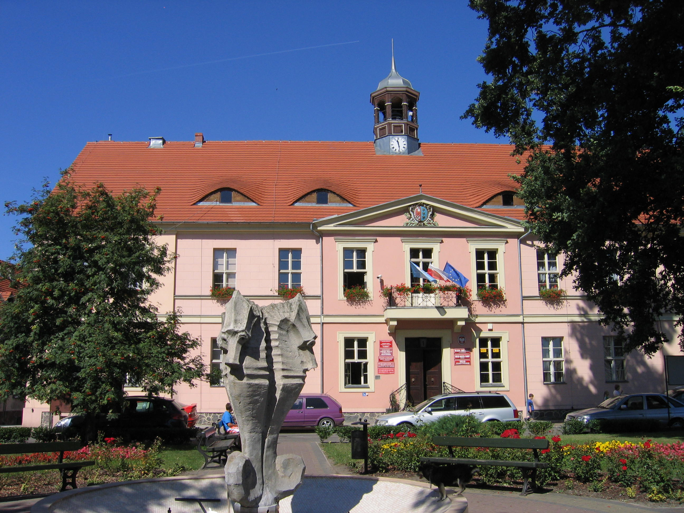 Lipiany, Rynek - ratusz